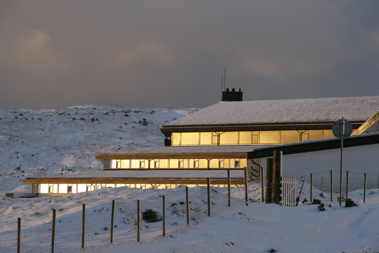 Hotel Føroyar in Tórshavn, Faroe Islands